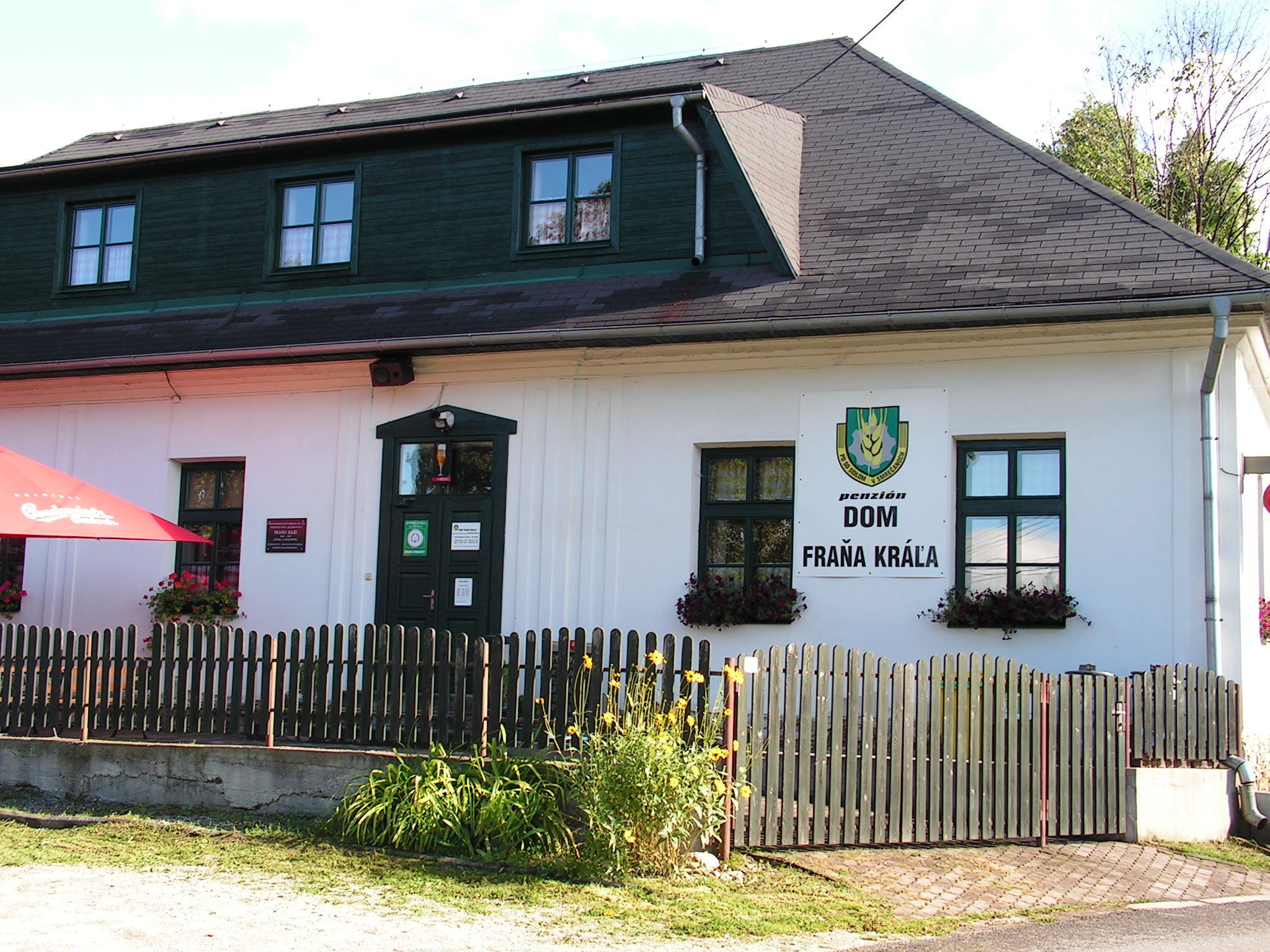 Dom Fraňa Kráľa v Smrečanoch